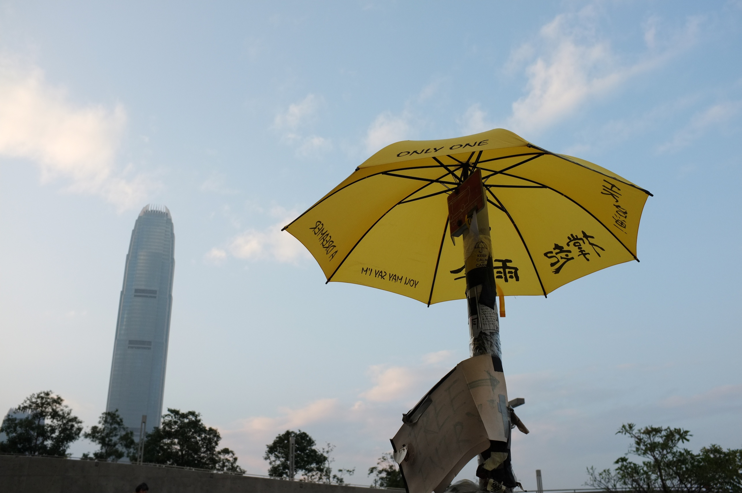 Umbrella Revolution @ Hong Kong 2014